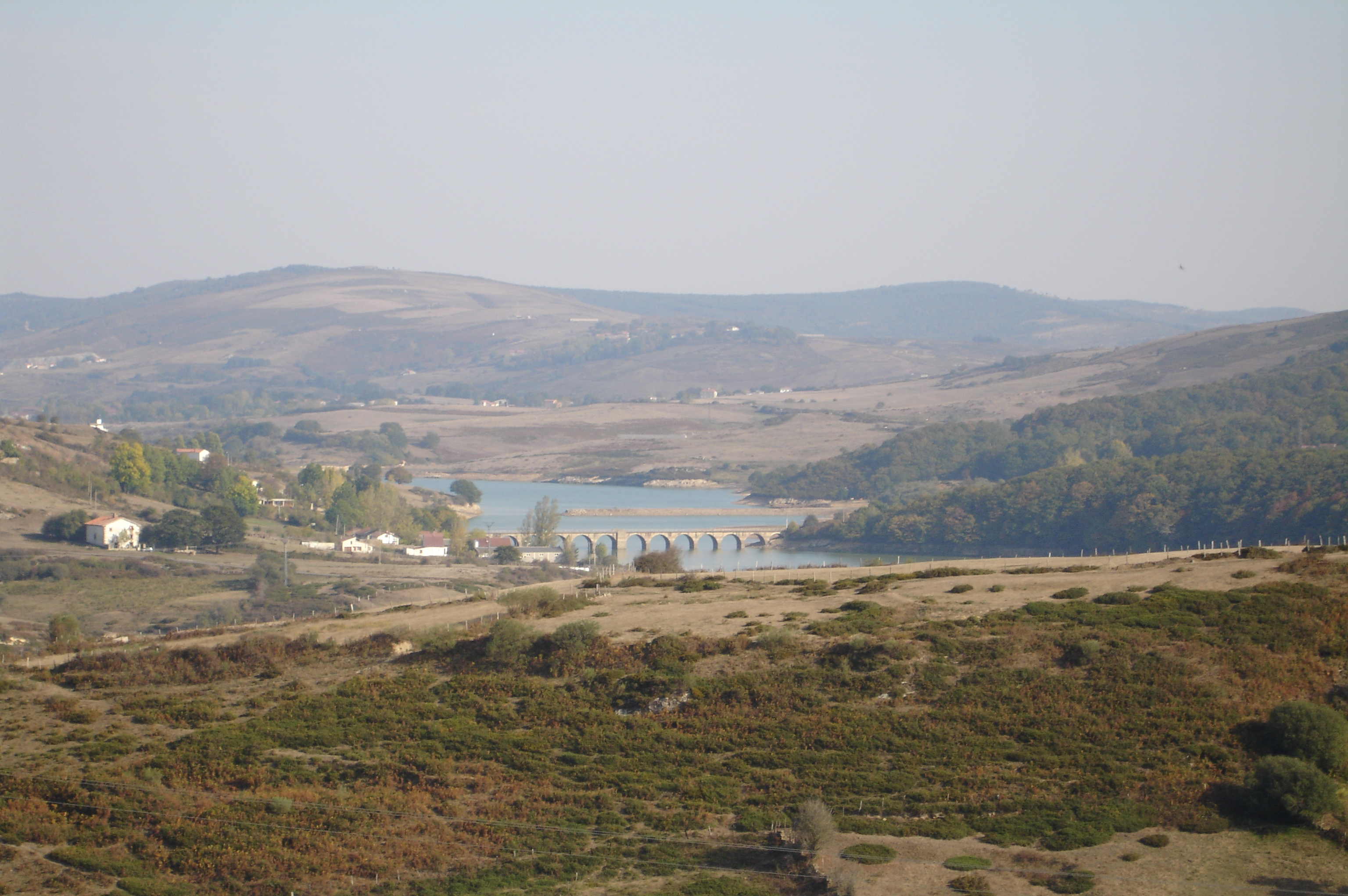 Vista parcial del Embalse del Ebro desde el sector de «La Llanuca», en Julióbriga.